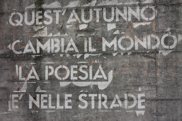 Reverse graffito realizzato a Torino per l'iniziativa 'I muri di Mirafiori' organizzato dall'associazione a.Titolo in collaborazione con lo scrittore WuMing1 e con l'agenzia di comunicazione GreenGraffiti Italia